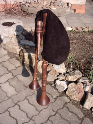 Mittelalterliche Marktsackpfeife a' (Dorisch)